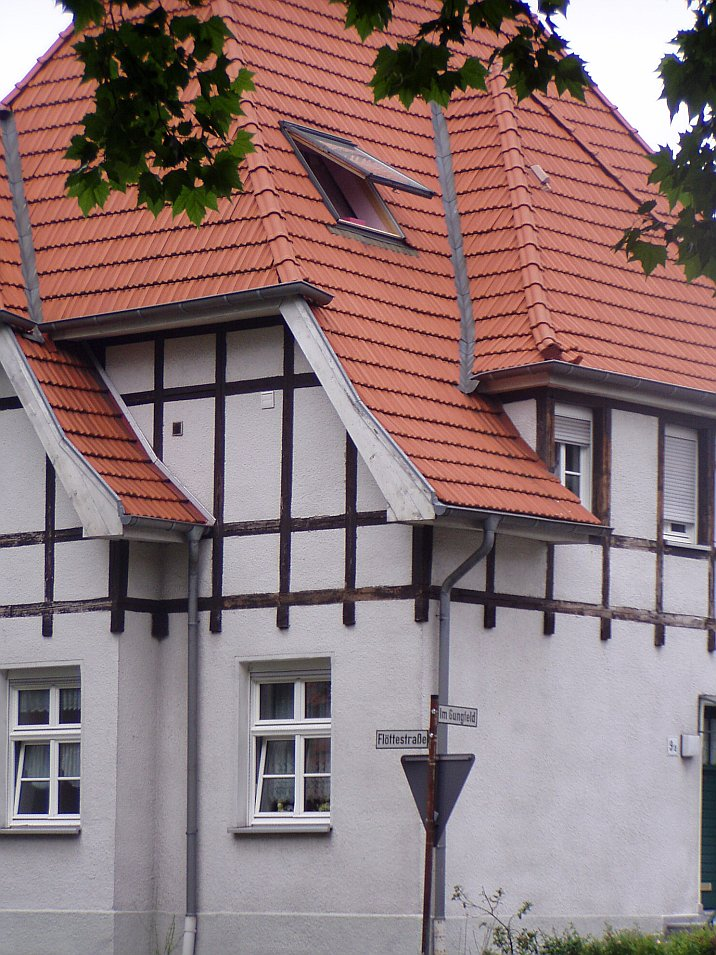 Haustyp in der Gartenstadt Welheim (Bottrop)